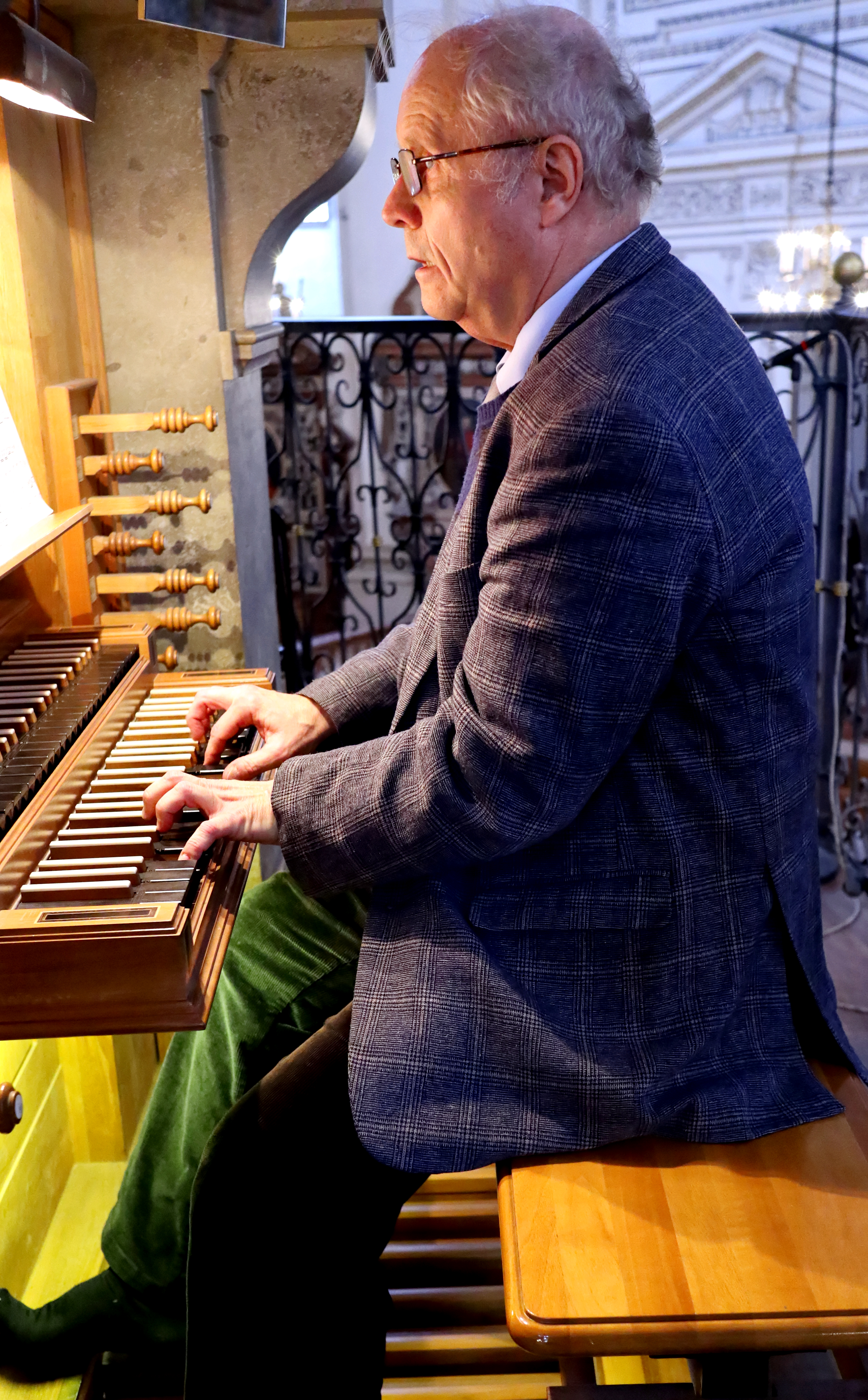 Kuppelorgeln im Salzburger Dom und Vorführung der Orgeln durch Domorganist Dr. Heribert Metzger und Organistin Sarah Kim.